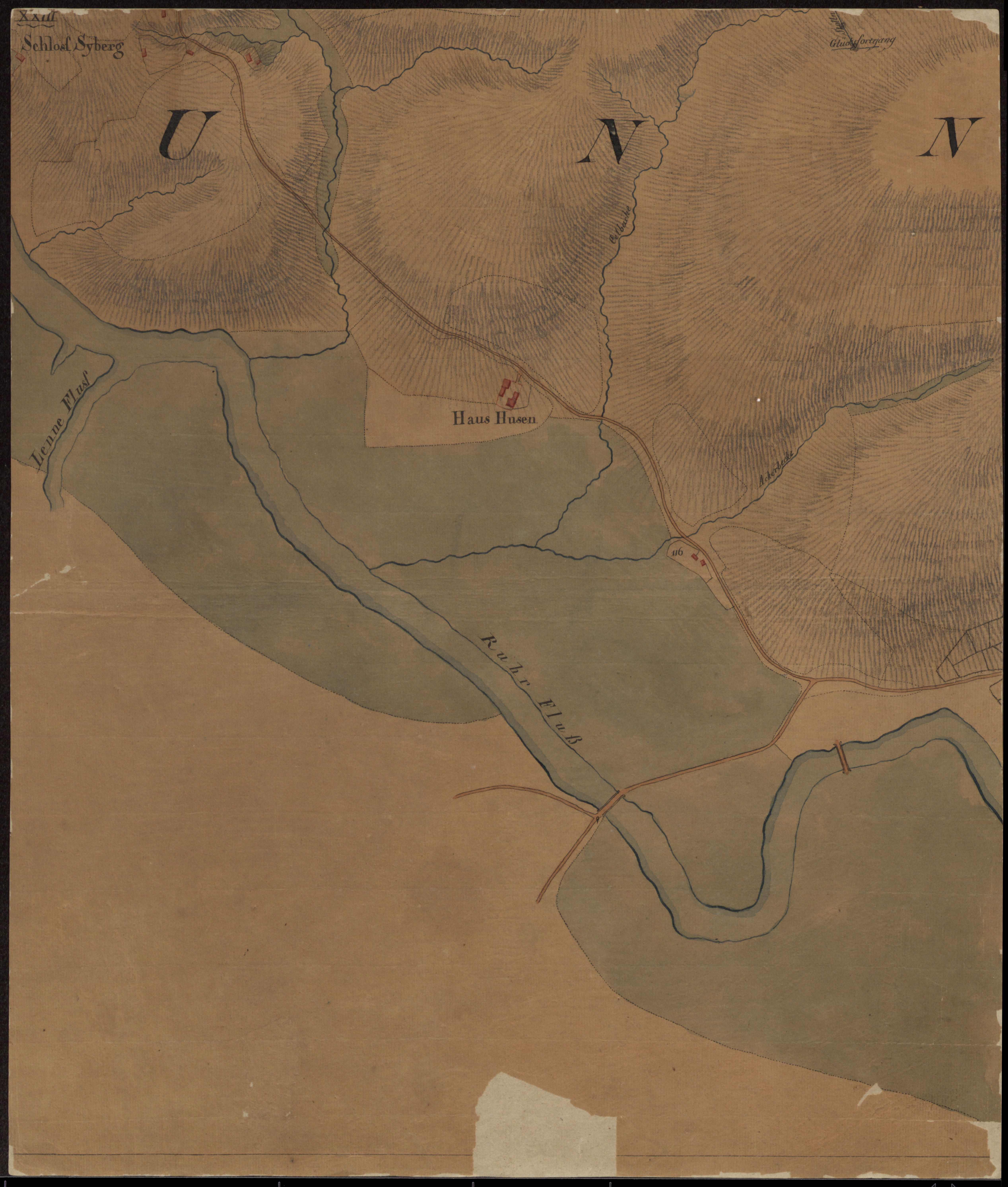 Spezialkarte des westlichen Teils des Distrikts Hoerde. Nachdruck als „Carte speciale des mines“.